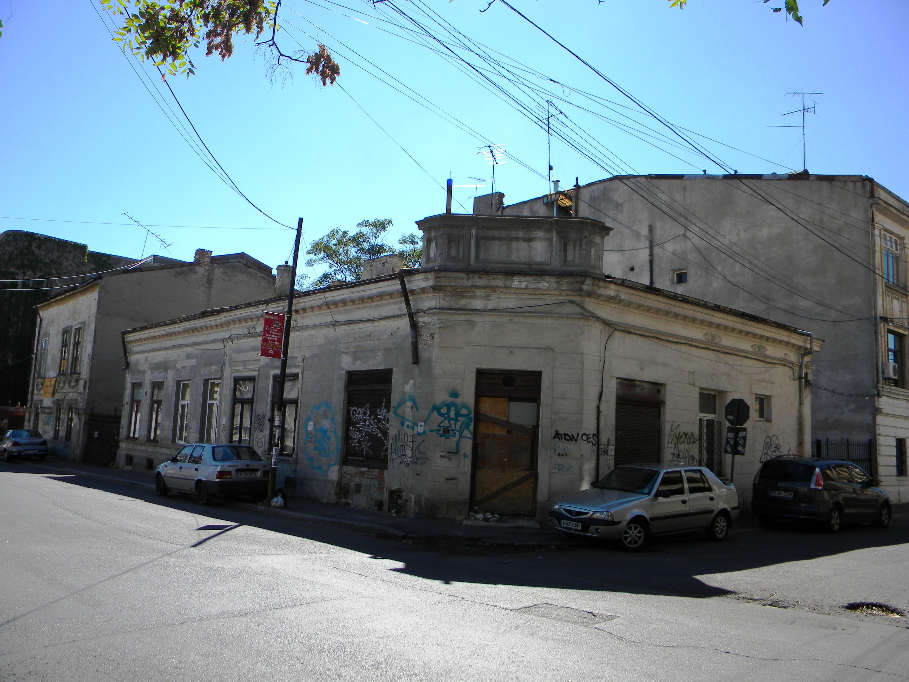 Bucuresti, Romania, Strada Hristo Botev nr. 36 (casa), sect. 3